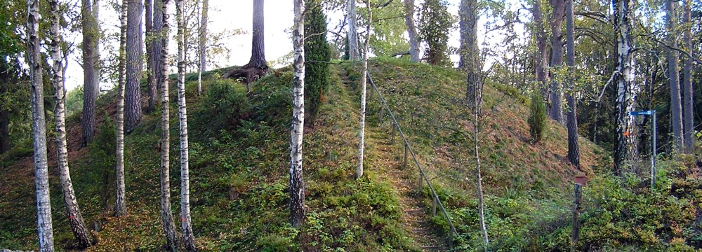 Sigfridskullen/Losborg från nordväst.